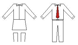 Uniforme del Colegio Internacional de Asunción, Paraguay.